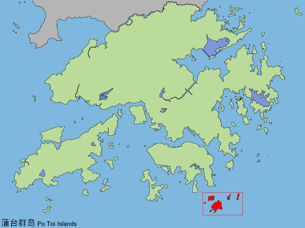 中文（香港）: 蒲台群島。